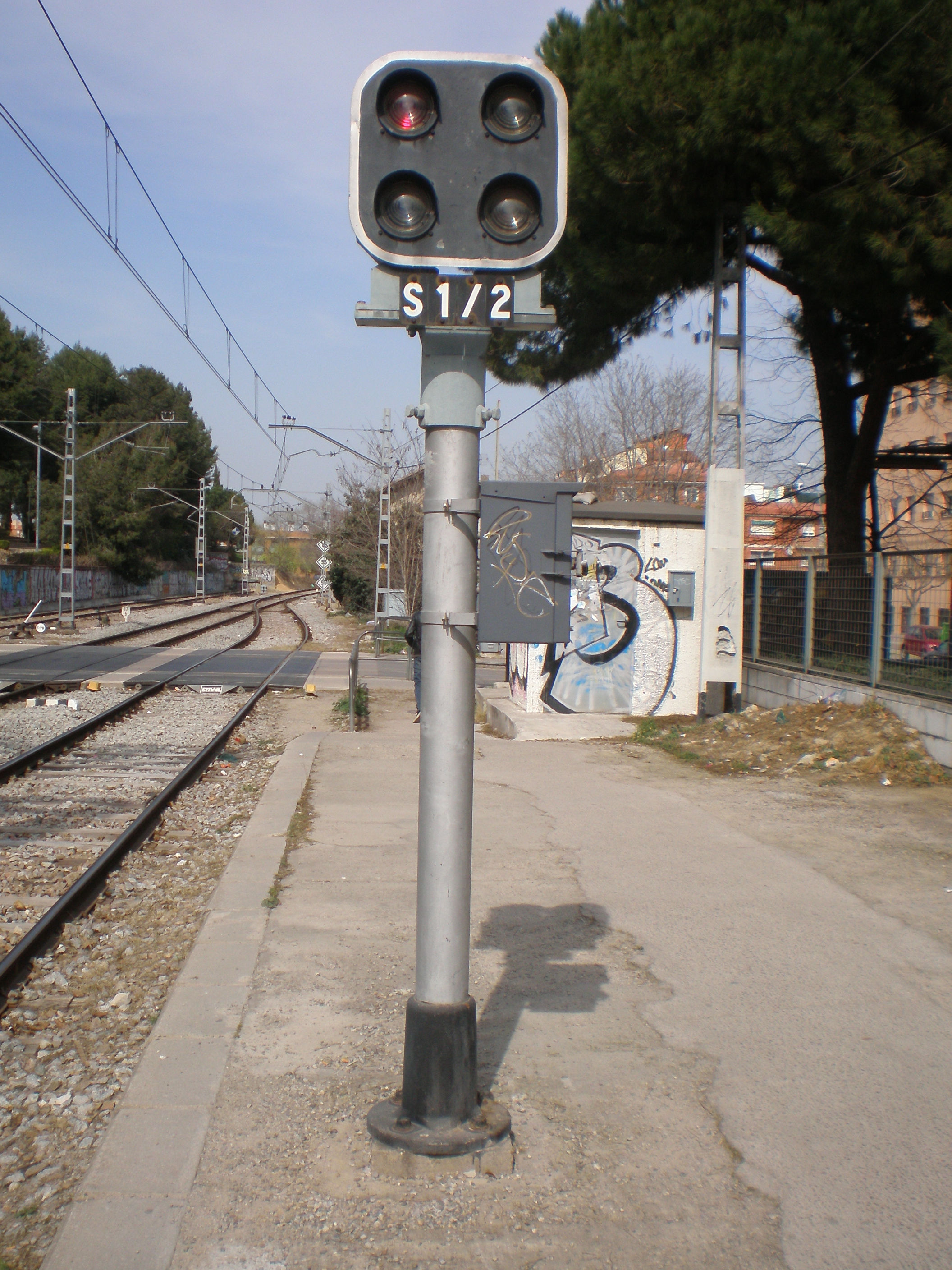 Señal de salida, lado Parets del Vallès, en la estación de Mollet Santa Rosa (Mollet del Vallès, comarca del Vallès Oriental, provincia de Barcelona, Catalunya).